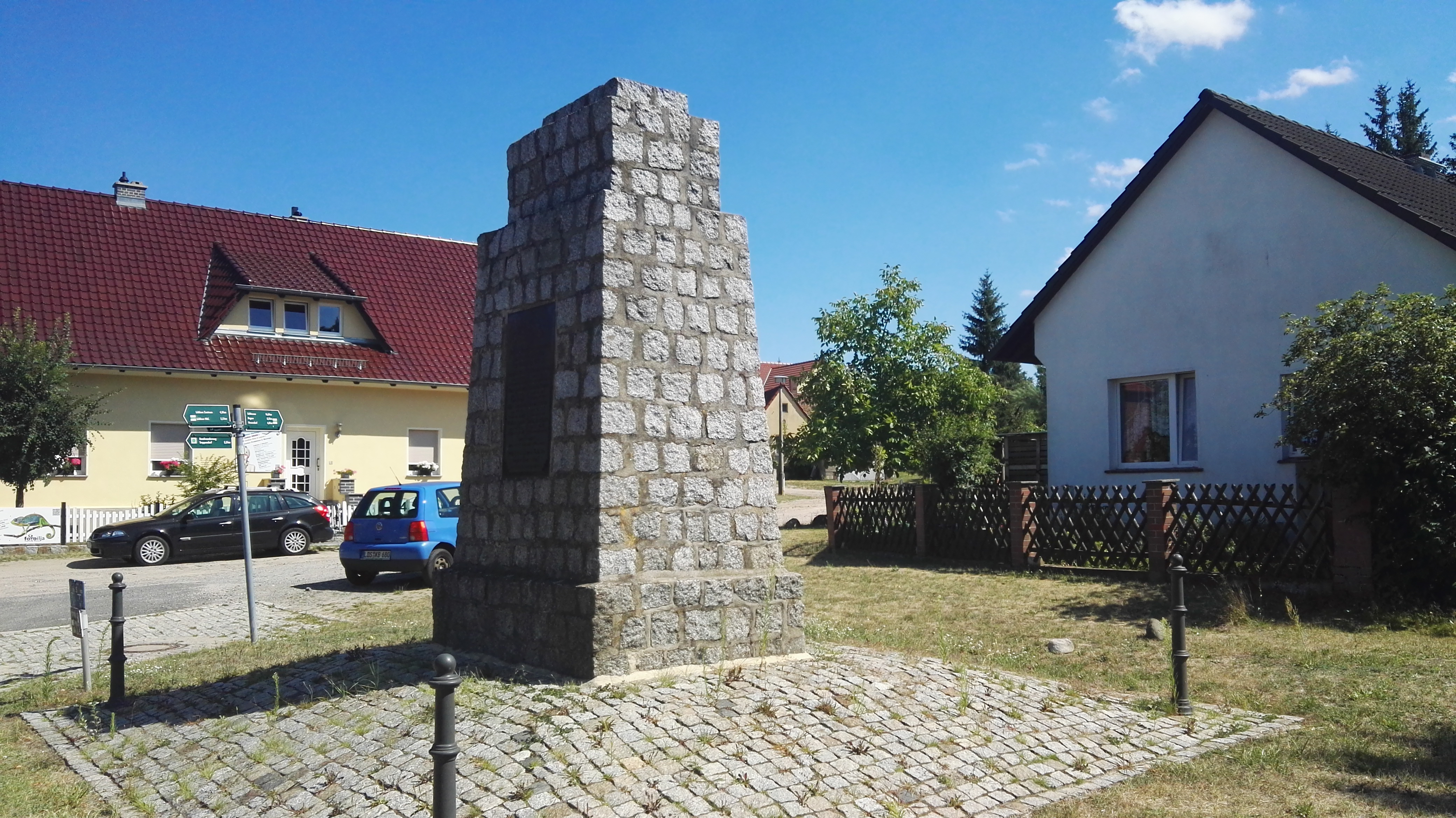 Denkmal für die Gefallenen des Ersten Weltkriegs in Lübben (Spreewald)